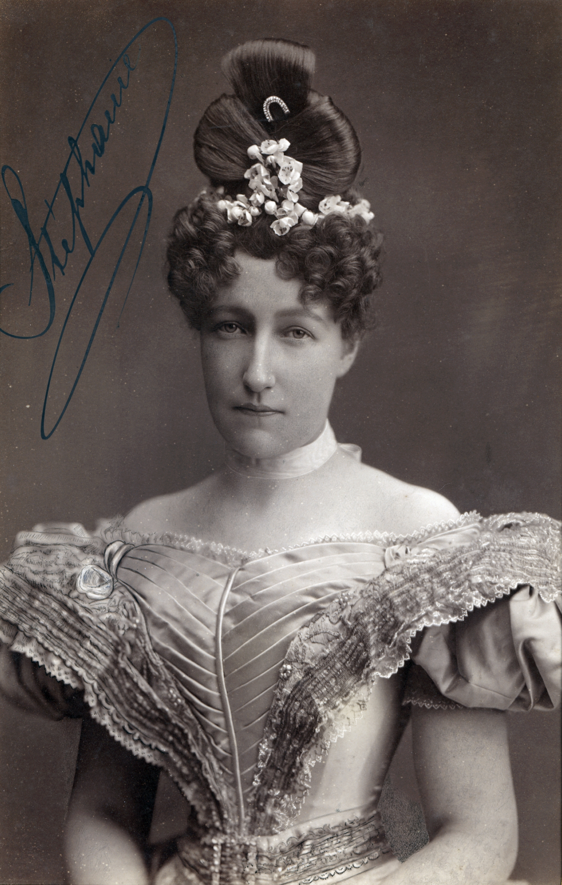 Kronprinzessin Stefanie (1864-1945)